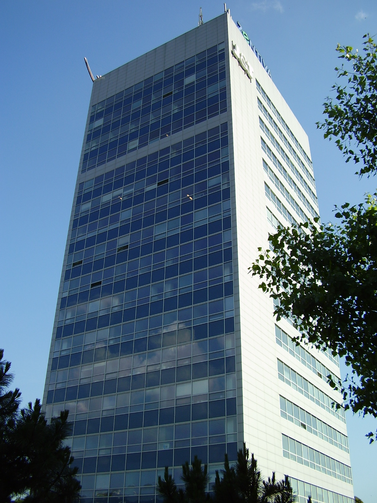 Pohľad z Lamačskej cesty.